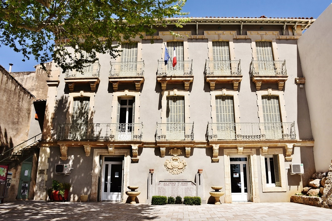 La Mairie